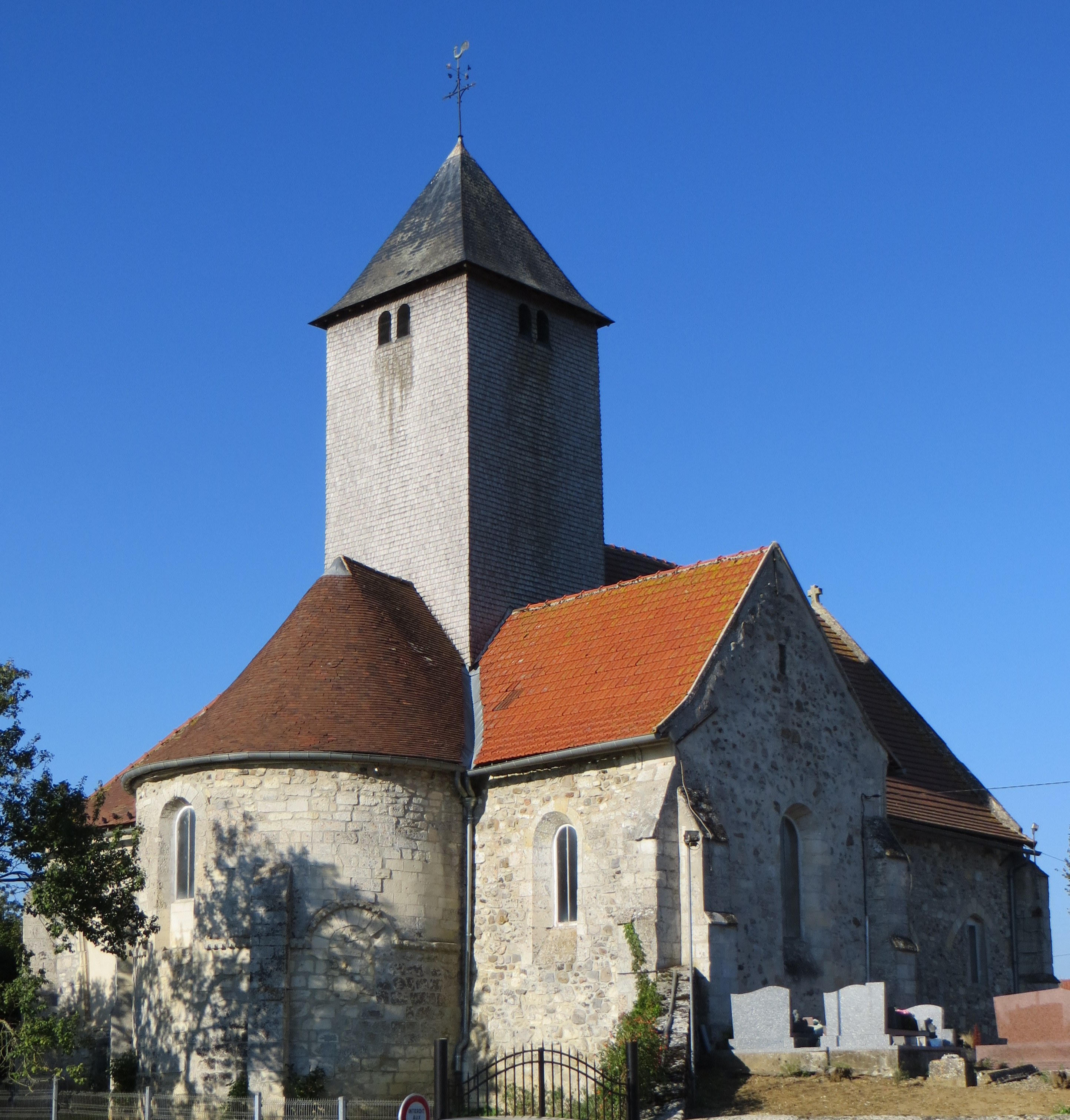 Vue générale de l'église Saint-Denis à Bargny (Oise, France).